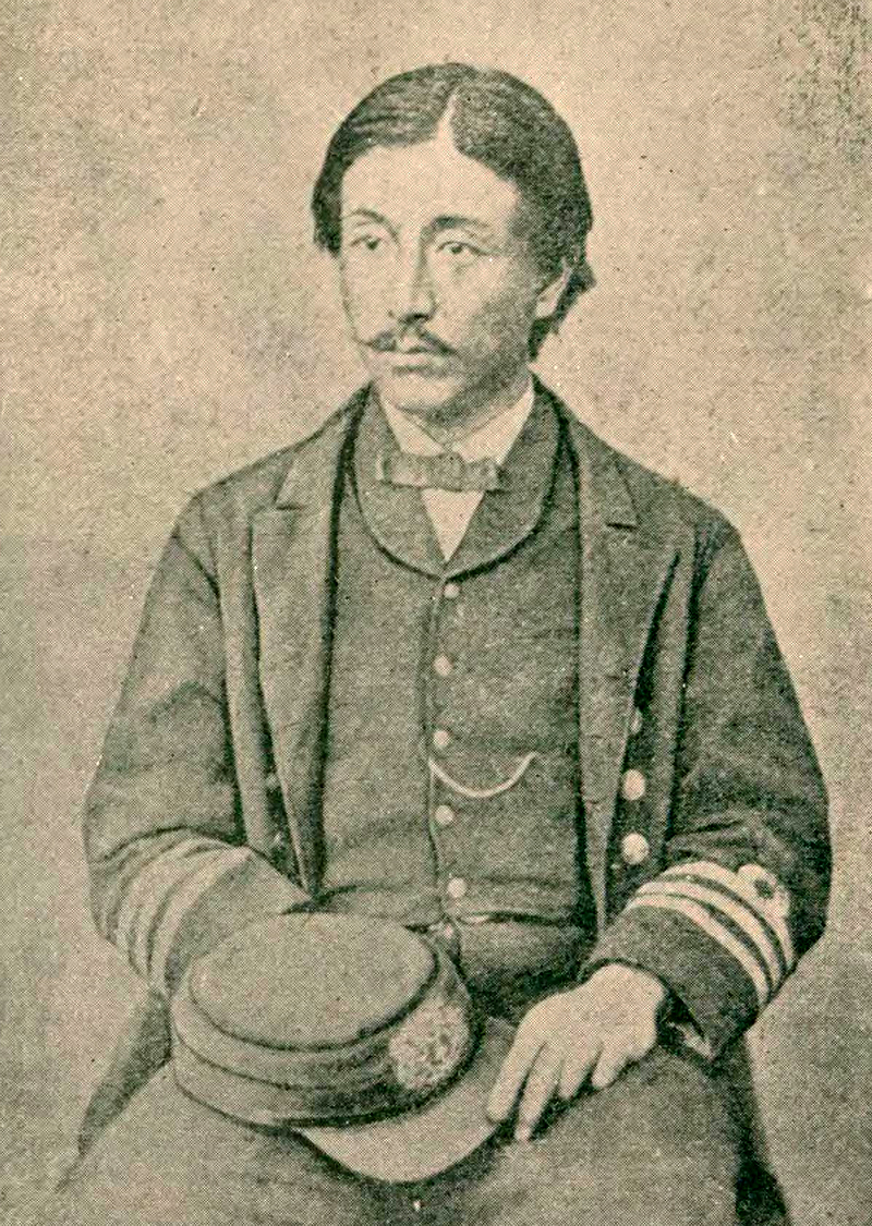 「幕末名家寫眞集1」 幕府軍艦蟠竜丸艦長松岡磐吉